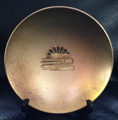 ちはや就役１５周年記念金杯